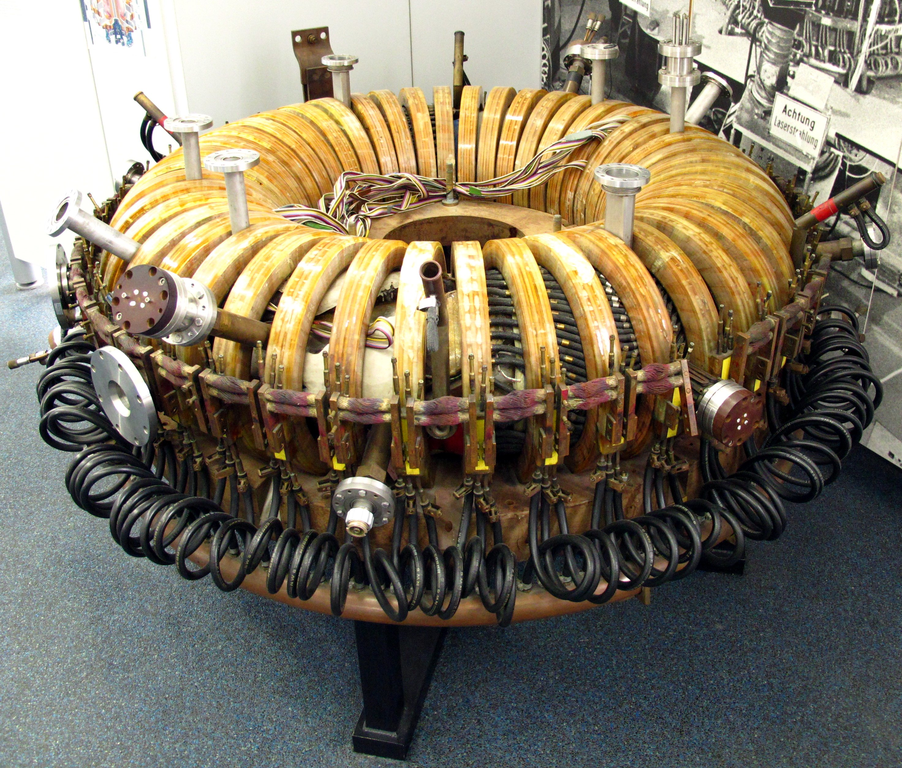 Stellarator aus dem Fusionsexperiment „Wendelstein-IIa“ Mit diesem Stellarator wurde 1967 am Max-Planck-Institut für Plasmaphysik in Garching erstmals ein torusförmiges Plasma realisiert. Den Torus umschliessen mehrere wassergekühlte Spulen. Rund um den Torus sind mehrere Öffnungen für Messsonden angebracht, mit denen das Plasma untersucht wurde.